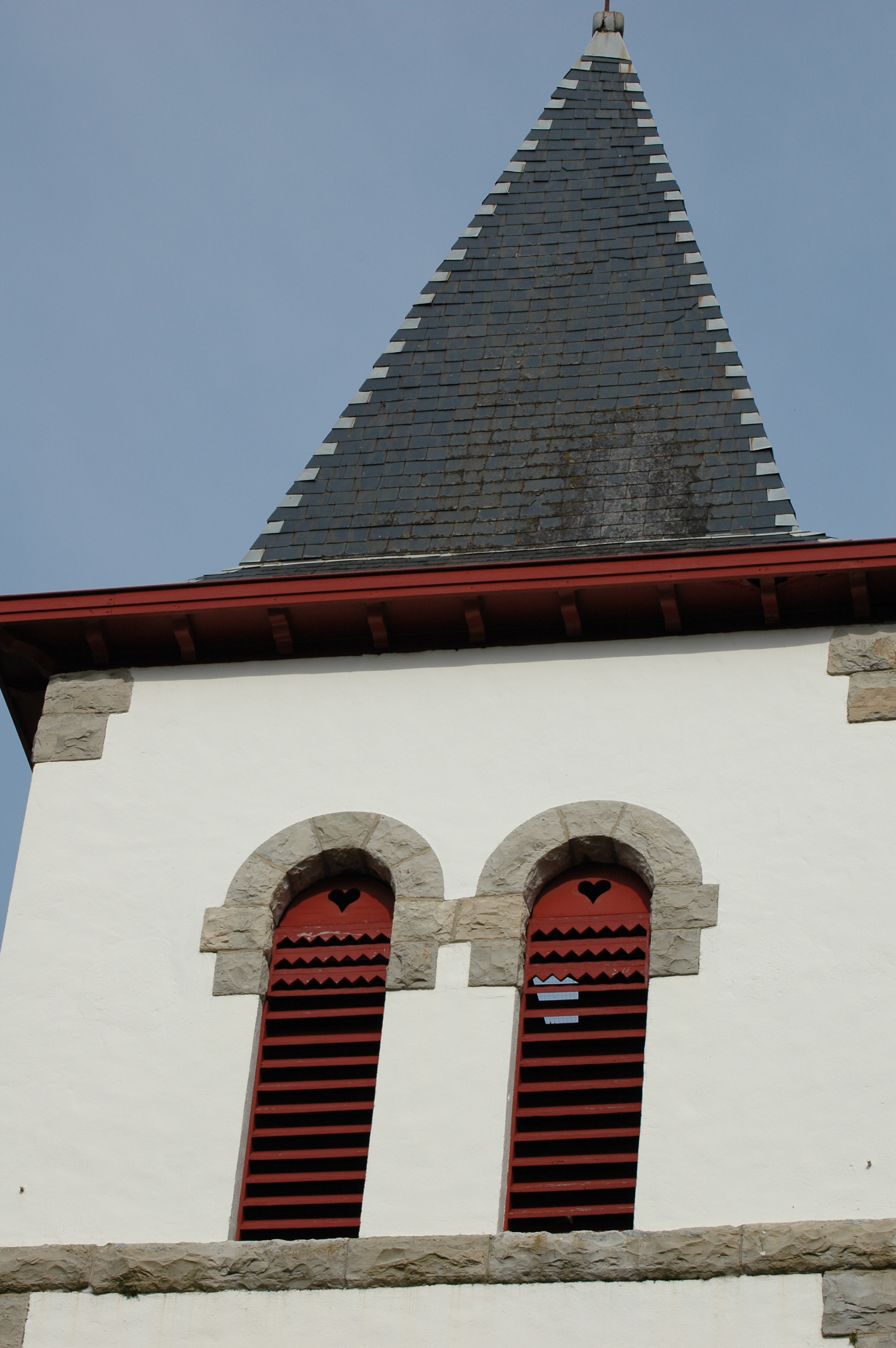 Méharin, l'église Saint-Laurent - Détail du clocher porche